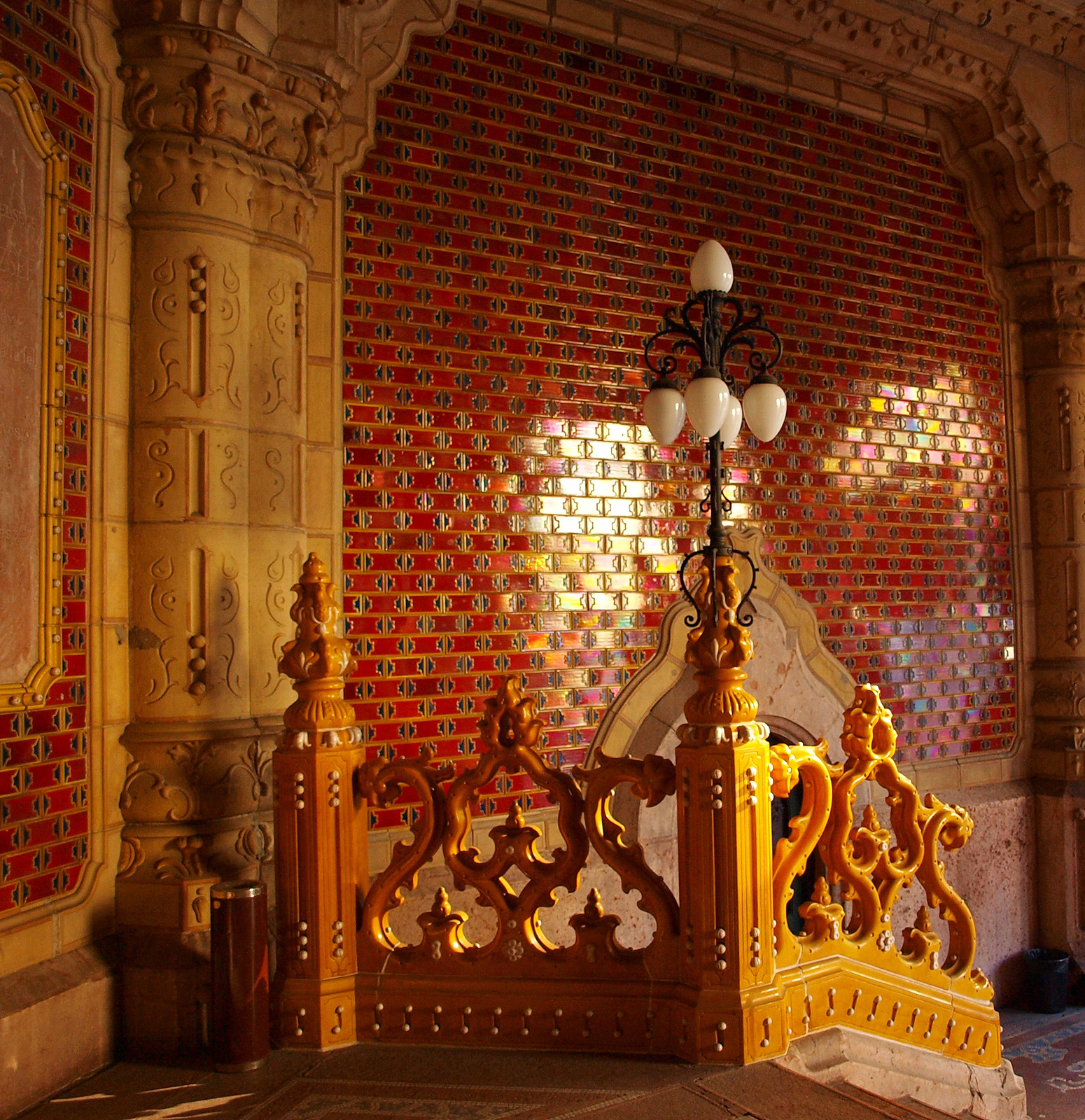 Iparművészeti Múzeum (Budapest 9, Üllői út 33-37., Hőgyes Endre utca 10-12., Kinizsi Pál utca 31.) This is a photo of a monument in Hungary. Identifier: 1070